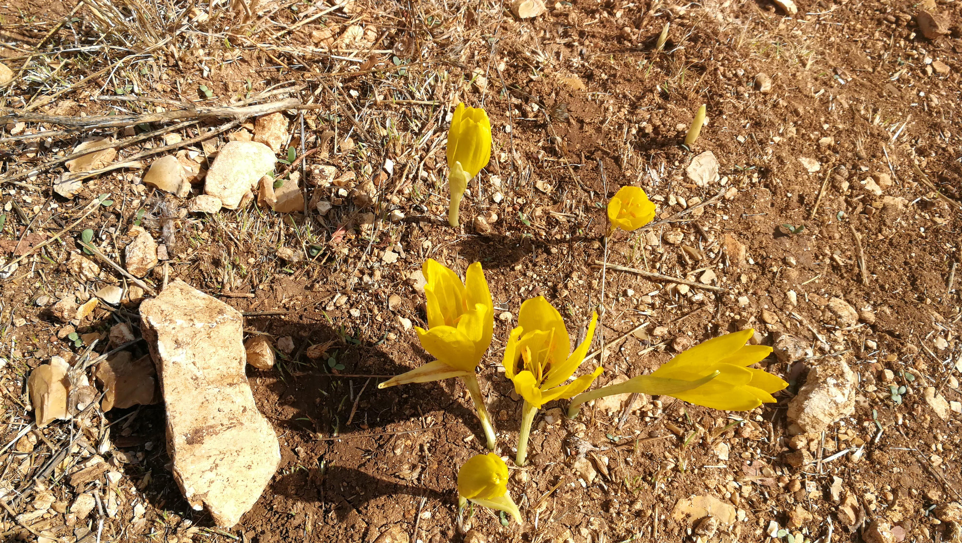 פריחת החלמוניות בהר מירון